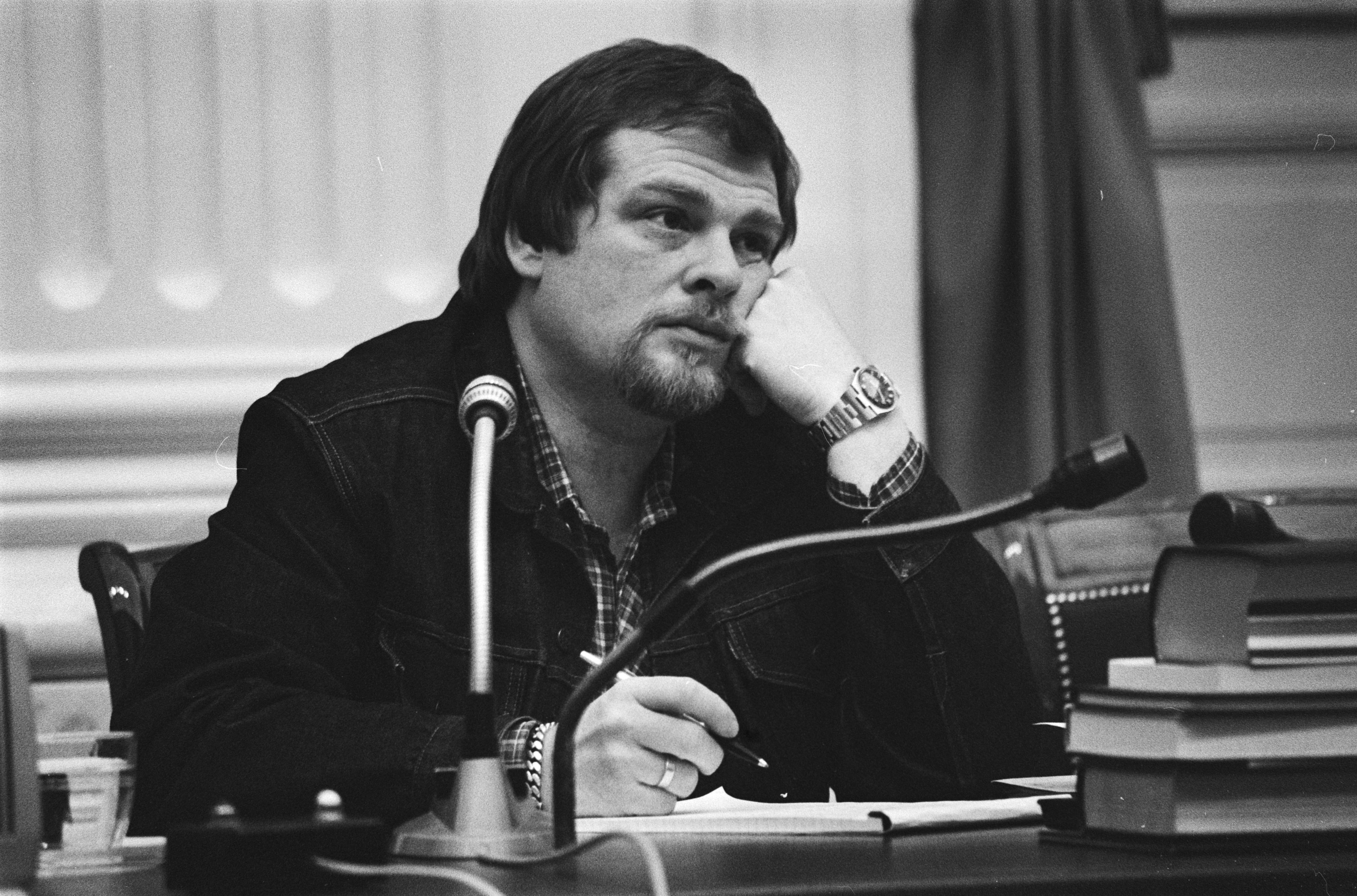 Collectie / Archief : Fotocollectie Anefo Reportage / Serie : [ onbekend ] Beschrijving : Tweede Kamer, behandeling begroting Financiën, Wetsontwerp Woningwet; staatssecretaris Jan Schaefer Datum : 18 januari 1977 Trefwoorden : begrotingen, behandelingen, financiën, wetsontwerpen Persoonsnaam : Schaefer, Jan Fotograaf : Suyk, Koen / Anefo Auteursrechthebbende : Nationaal Archief Materiaalsoort : Negatief (zwart/wit) Nummer archiefinventaris : bekijk toegang 2.24.01.05 Bestanddeelnummer : 928-9863